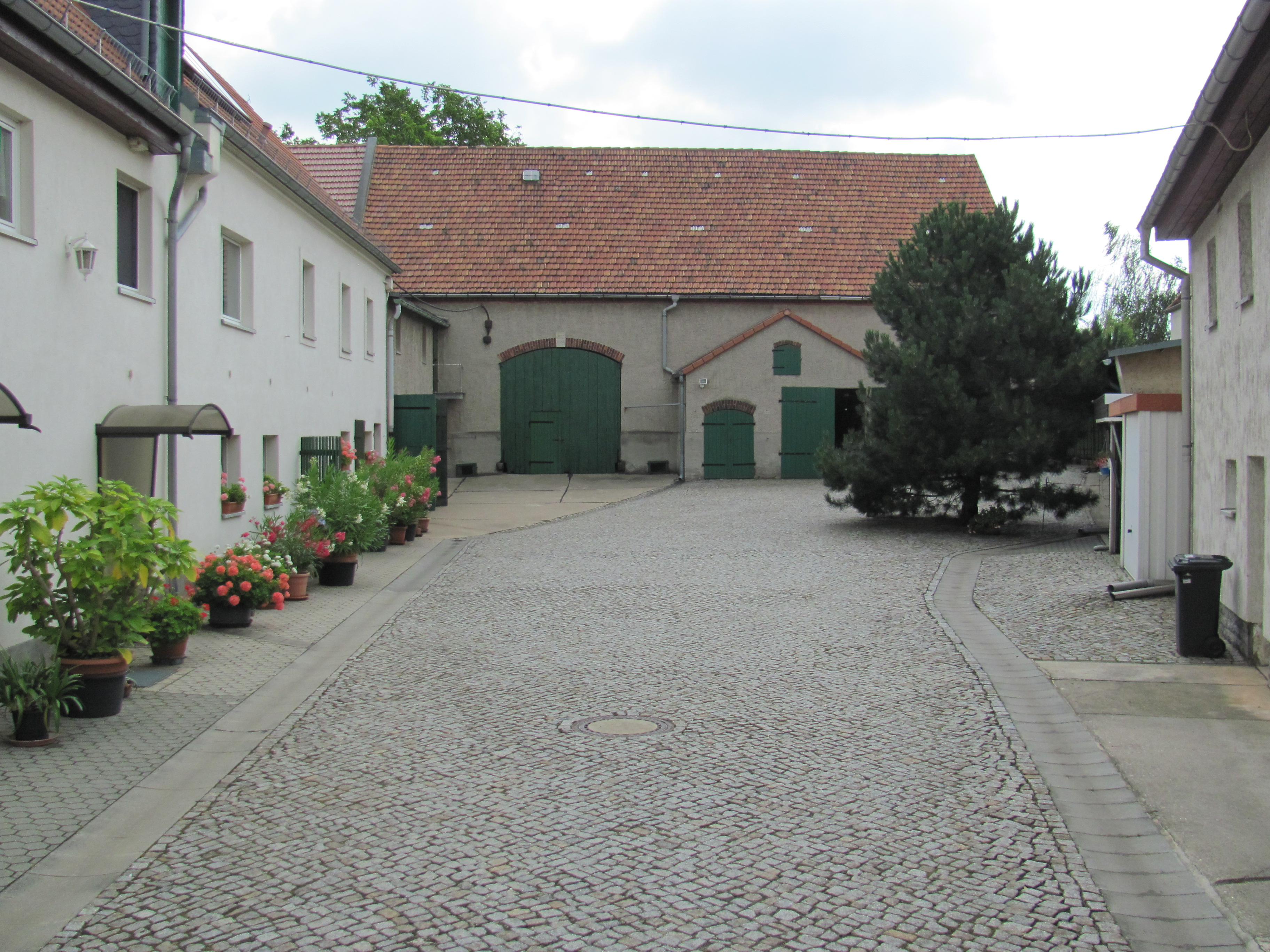 Altnaundorf